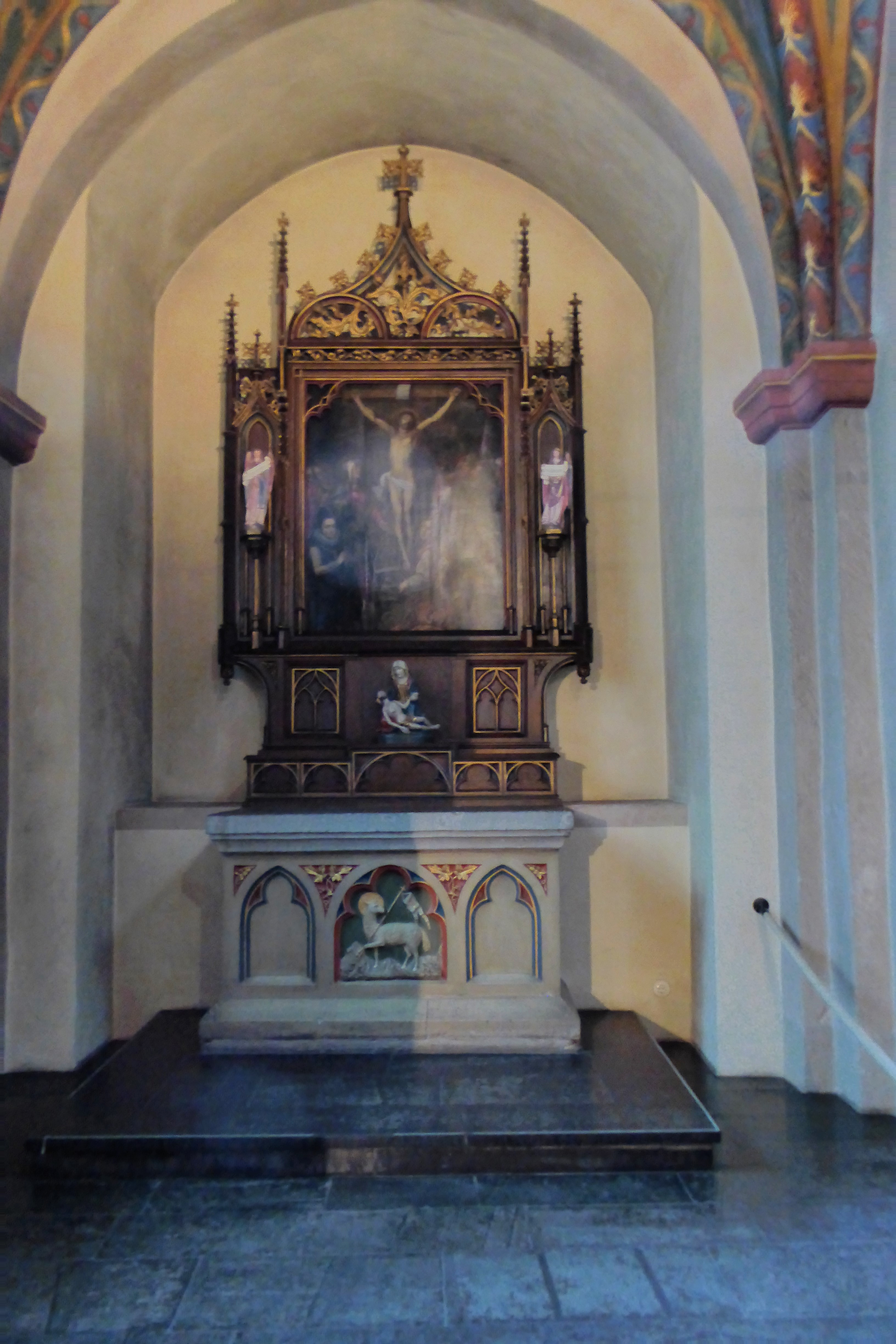 Tryptichon in St. Maria Lyskirchen